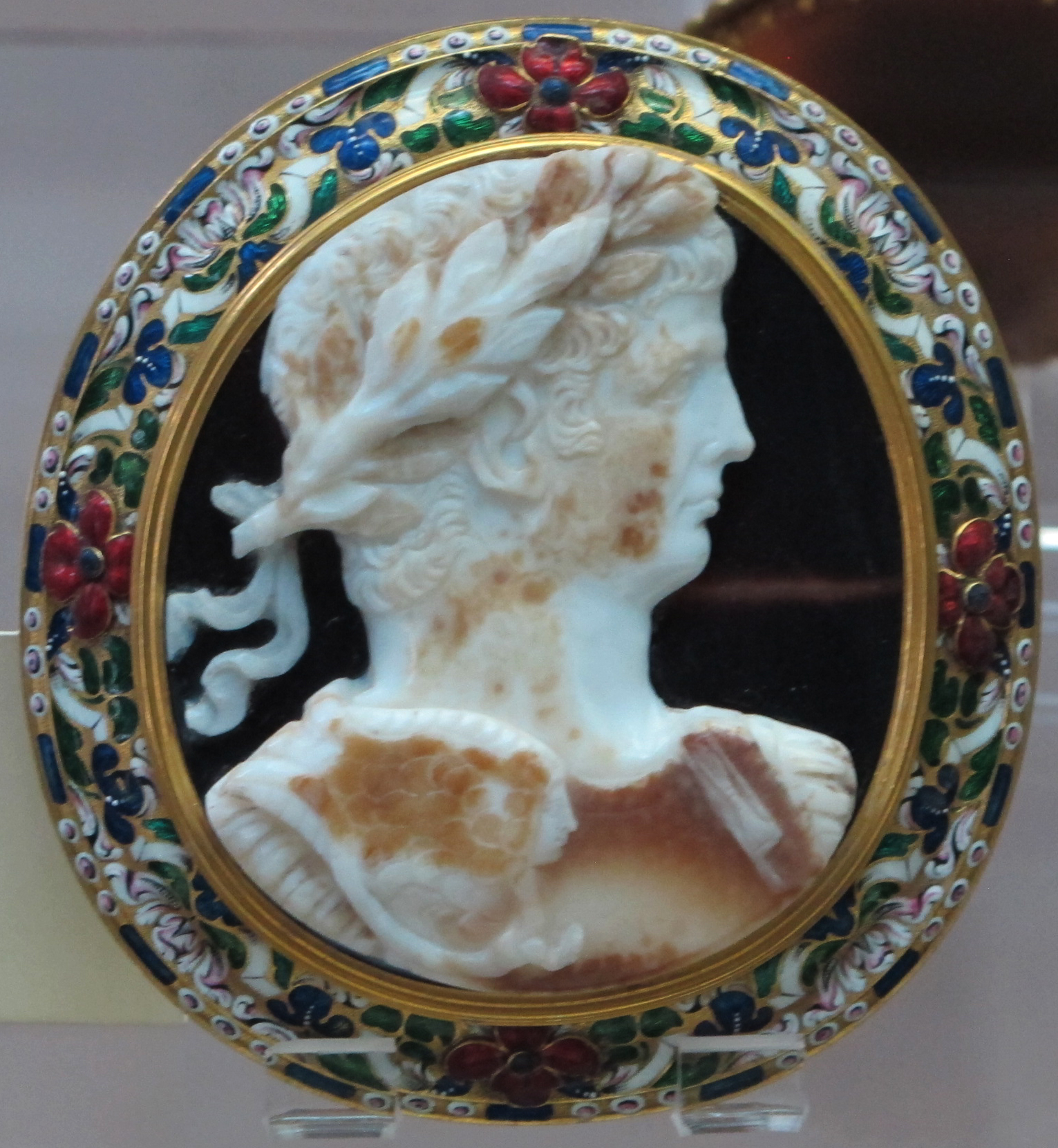 Arte romana, Claudio, agata-onice